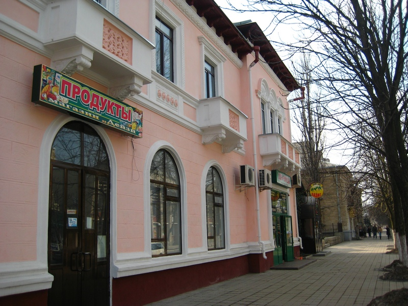 Филиал гостиницы "Нистру"